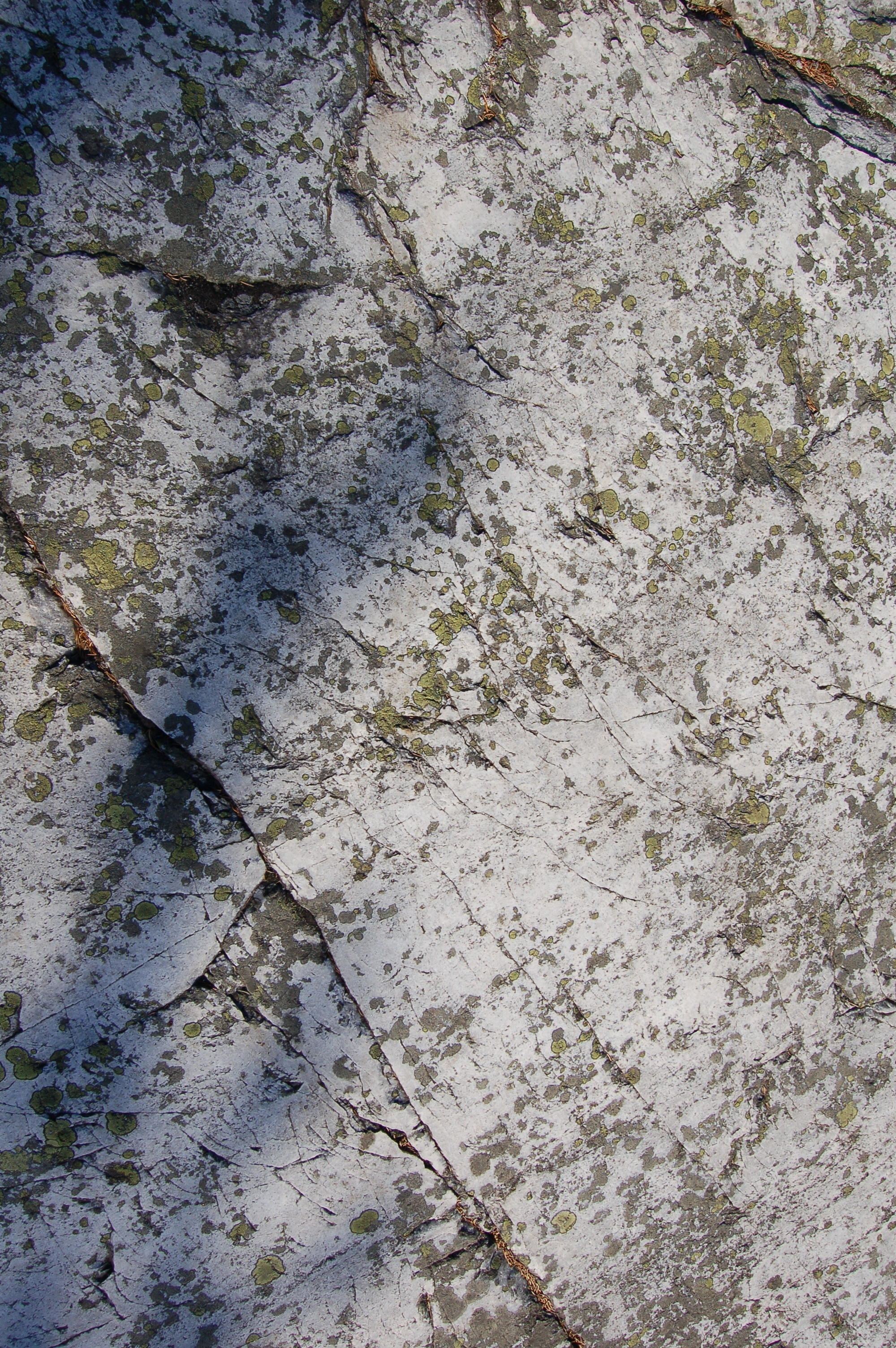 Akka-Koli in Koli National Park.